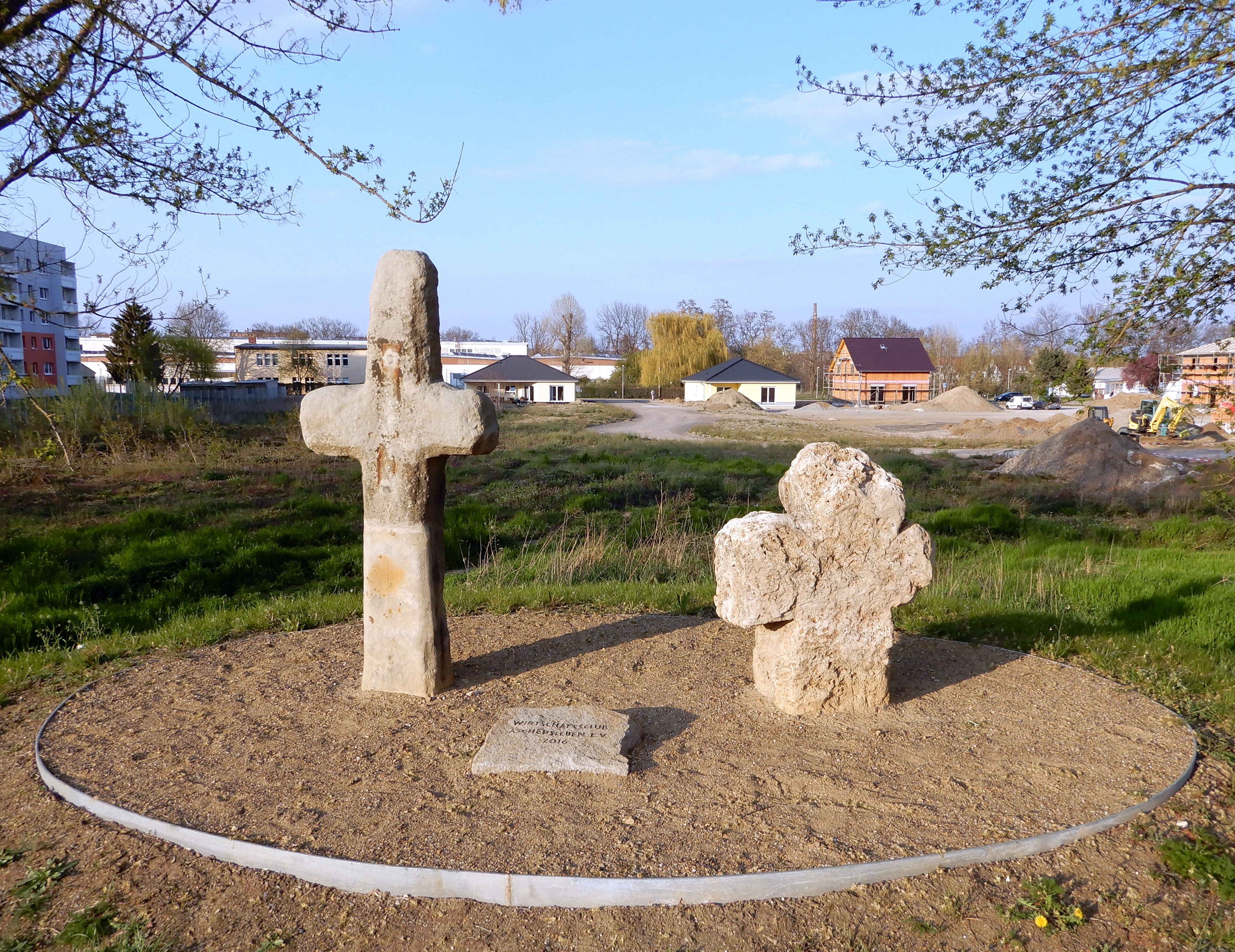 Sühnekreuze Mehringer Straße in Aschersleben